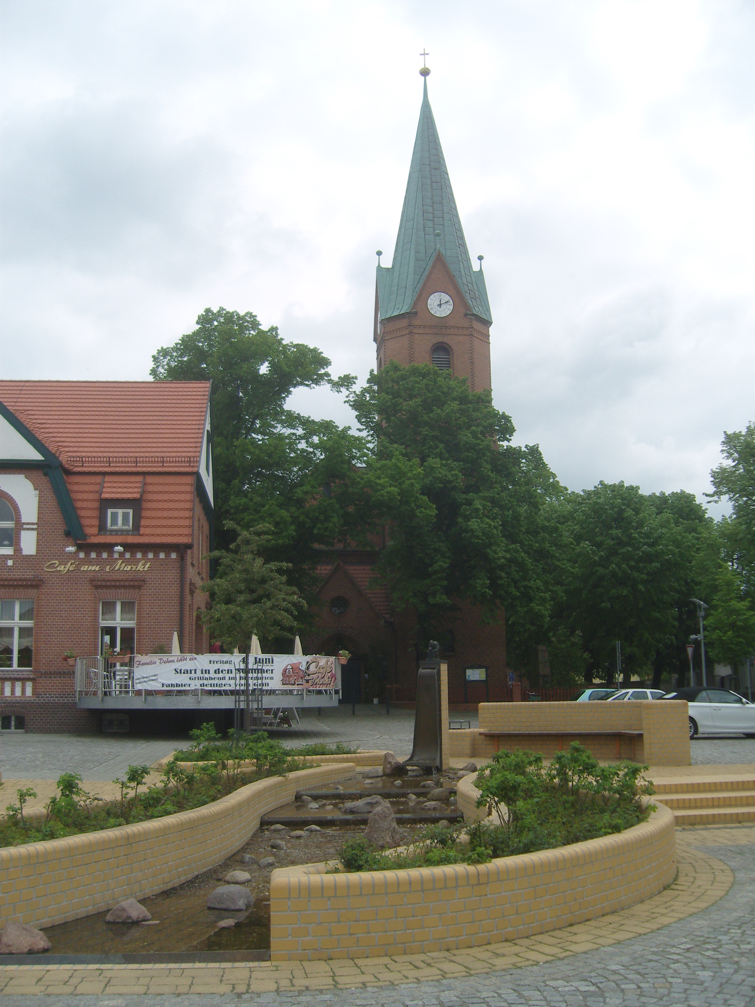 Brunnen auf dem Markt im Hintergrund die evangelische Stadtpfarrkirche in Großräschen, Baudenkmal